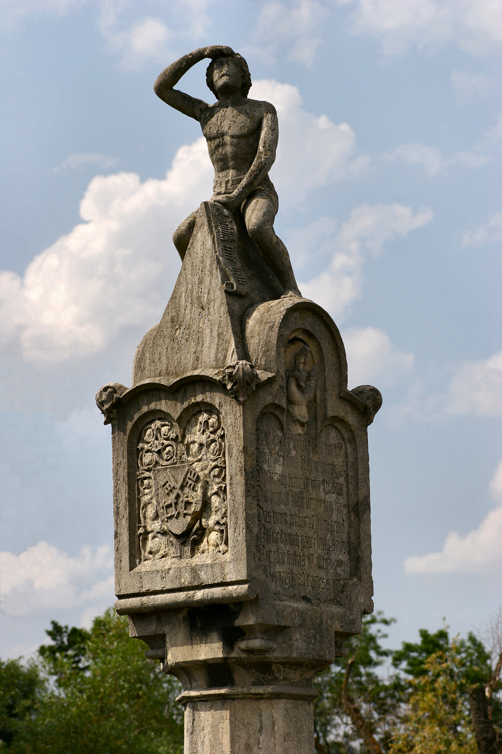 Beschreibung: Bruckmandl auf der Steinernen Brücke in Regensburg Quelle: selbst fotografiert Datum: Juli 2006 Fotograf: Karsten Dörre (grizurgbg)